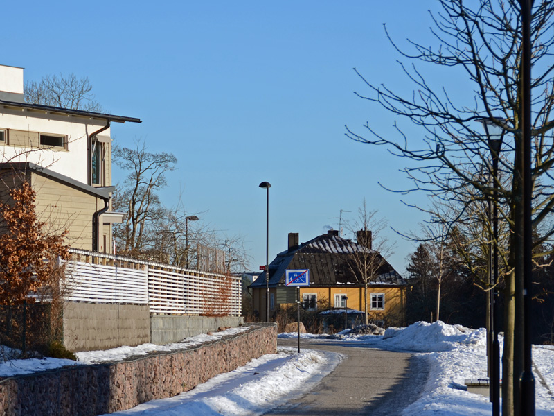 Rådans manbyggnad sedd från Parkpromenaden, Silverdal, Sollentuna